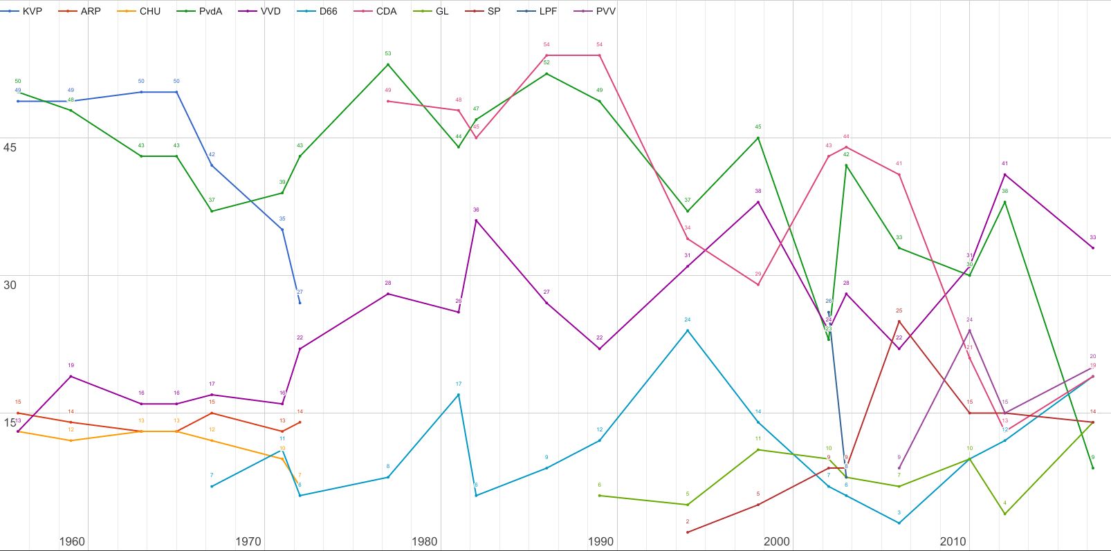 Grafiek van historische zetelverdeling in de tweede kamer sinds er 150 te verdelen waren vanaf 1956. Alleen partijen die ooit meer dan tien zetels haalden zijn meegenomen.